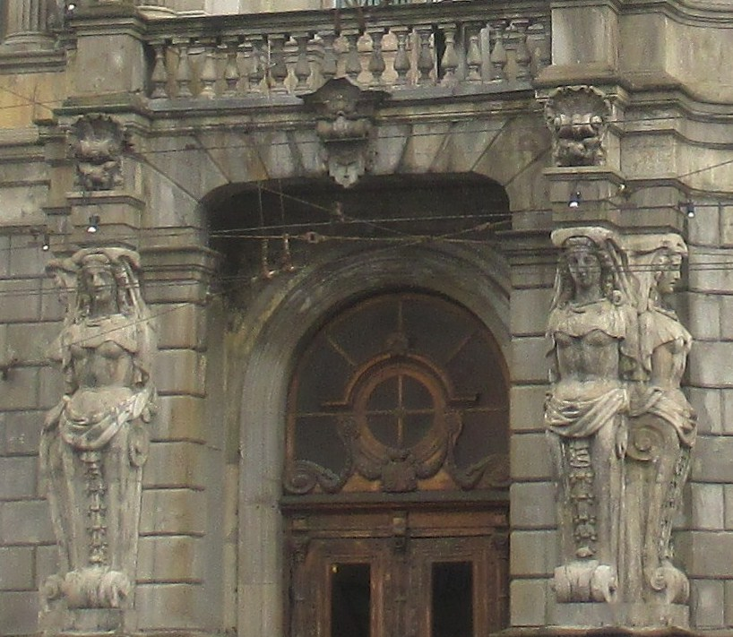 Caryatides de l'ancien hôtel particulier Youssoupov - 42 Liteïny prospekt à Saint-Pétersbourg.